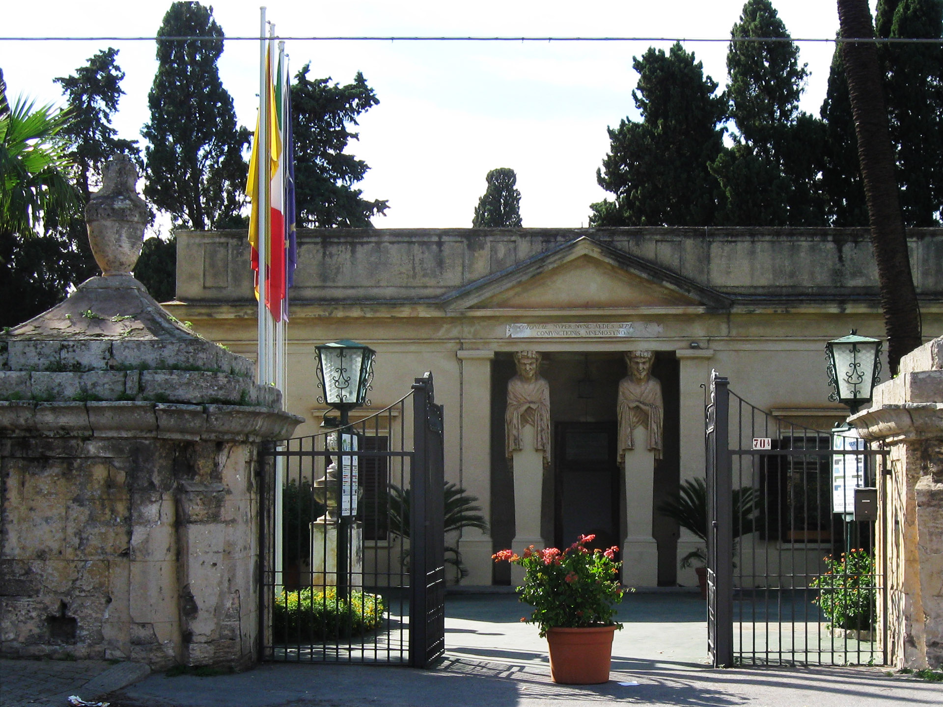 Ingresso del Teatro di Verdura - Palermo (Italy)